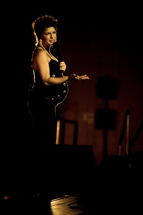 עדי אשכנזי בהופעה באולם סמולארש באוניברסיטת ת"א